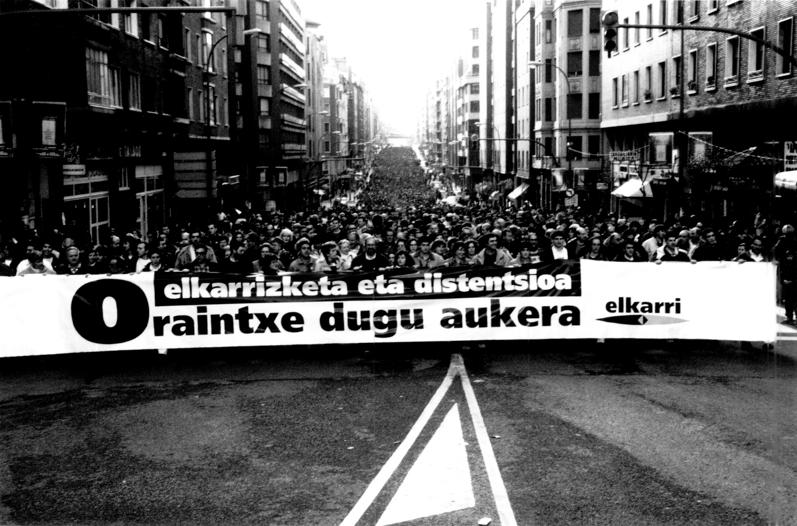 Elkarriren manifestazioa Bilbon 1994 urtean